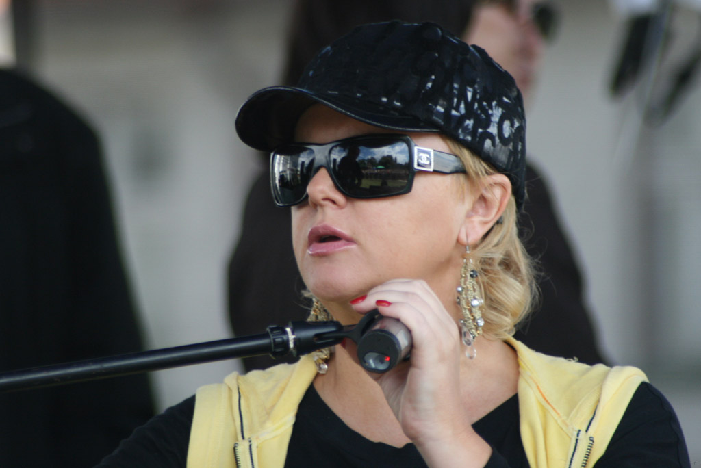 Joanna Kurowska